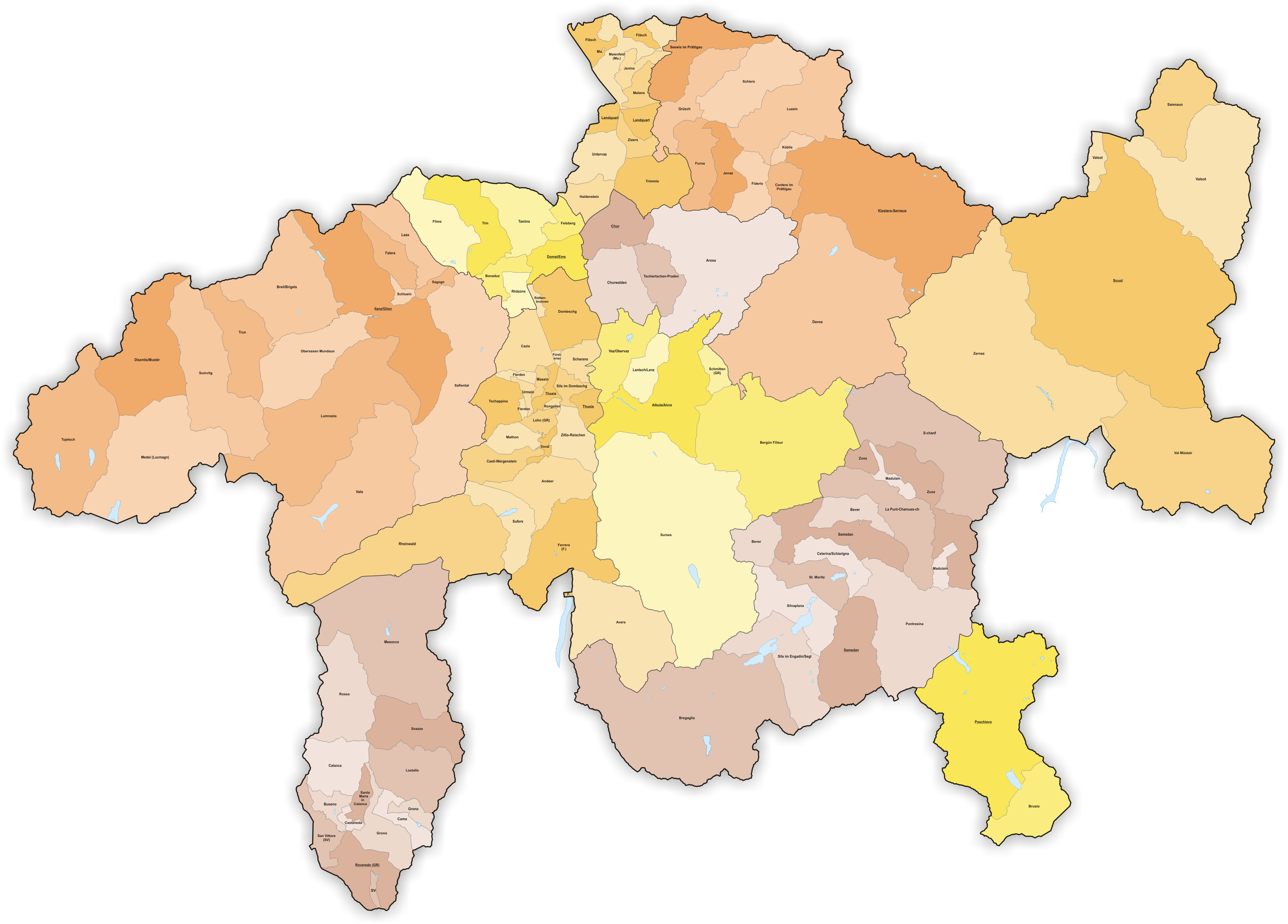 Municipalities in Canton Graubünden